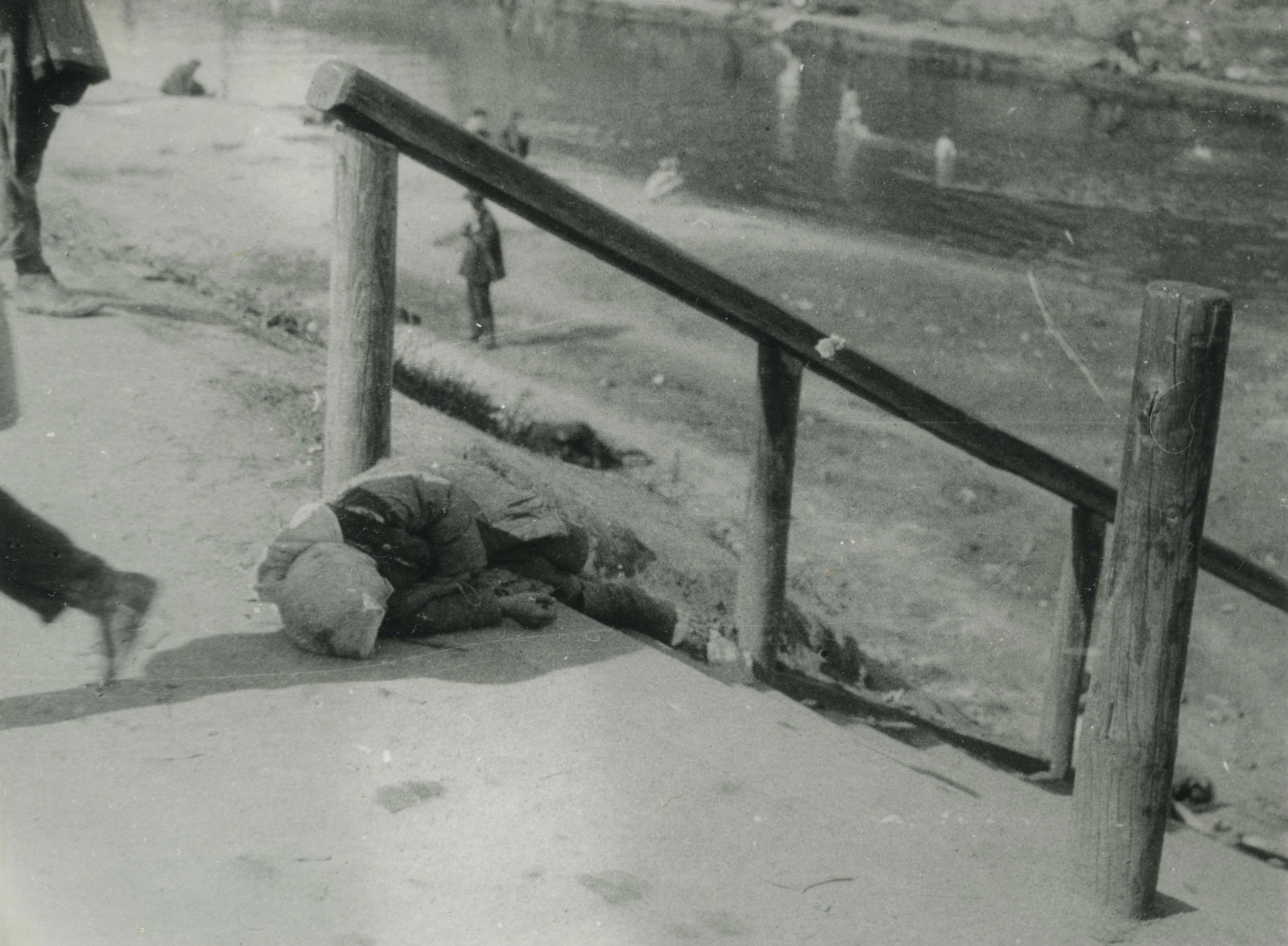 Померла дитина на вулиці Харкова, 1933 р. Фото з Колекції Кардинала Теодора Інніцира (Архів Віденської Дієцезії) Фото зробив інж. А. Вінербергер Фотодокументи надані проф. Василем Марочком (Інститут історії України НАН України).